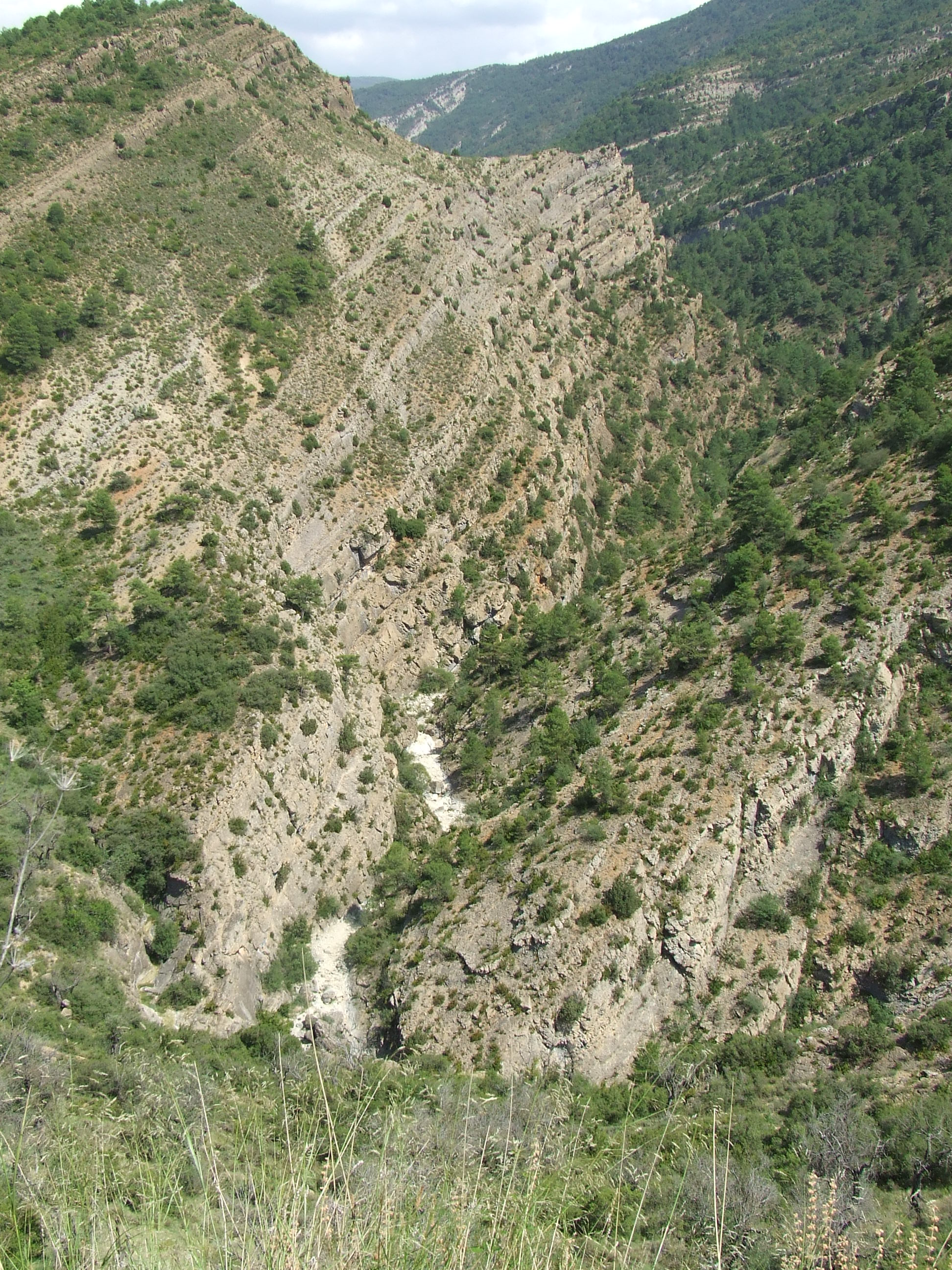 El riu de Carreu al seu pas per Aramunt Vell (Conca de Dalt, Pallars Jussà)